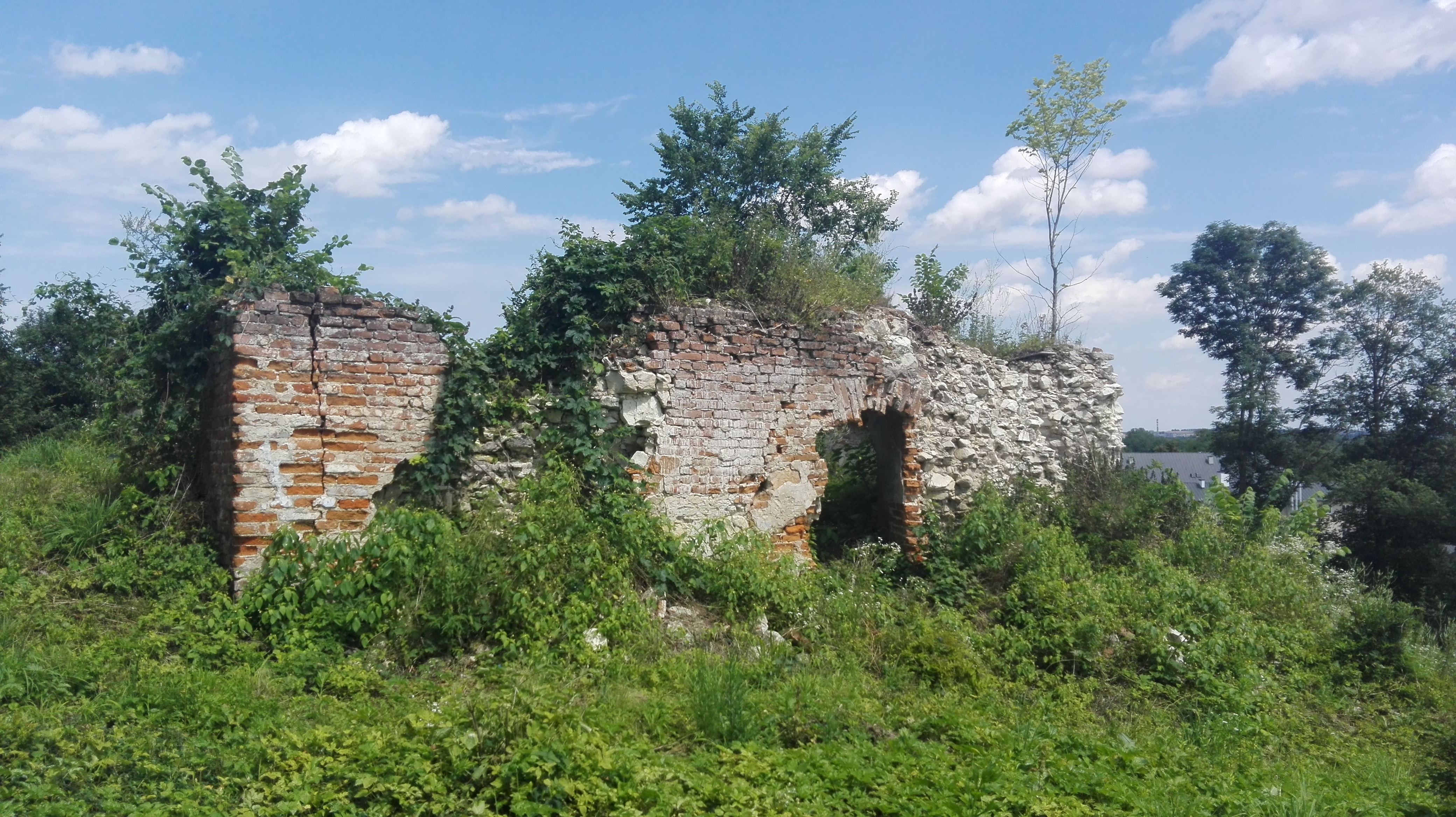 Ruiny wieży zamkowej z 2 połowy XIV wieku, przebudowanej w XVI wieku.